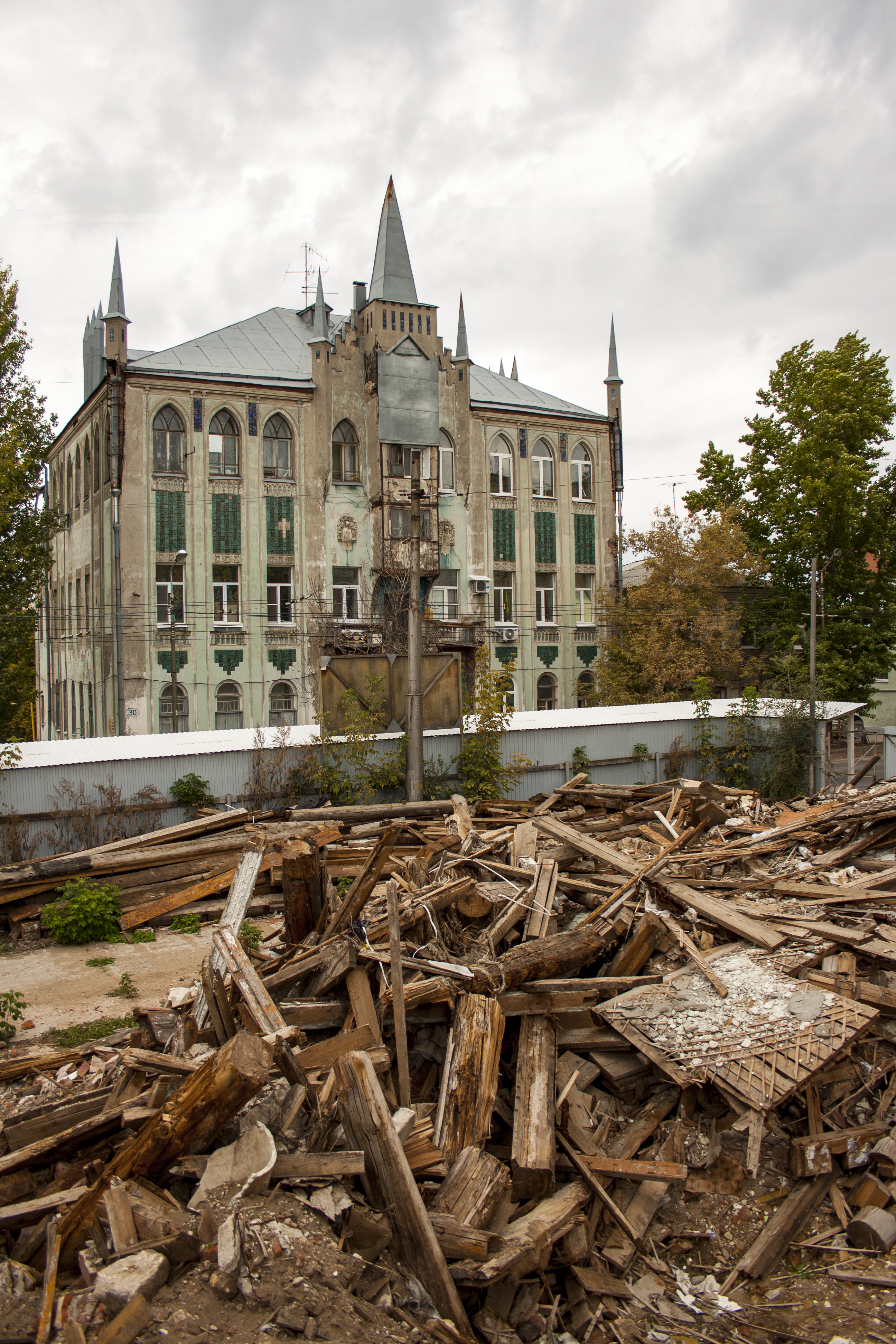 Дом Субботиной-Маркисон (ул. А.Толстого 30)